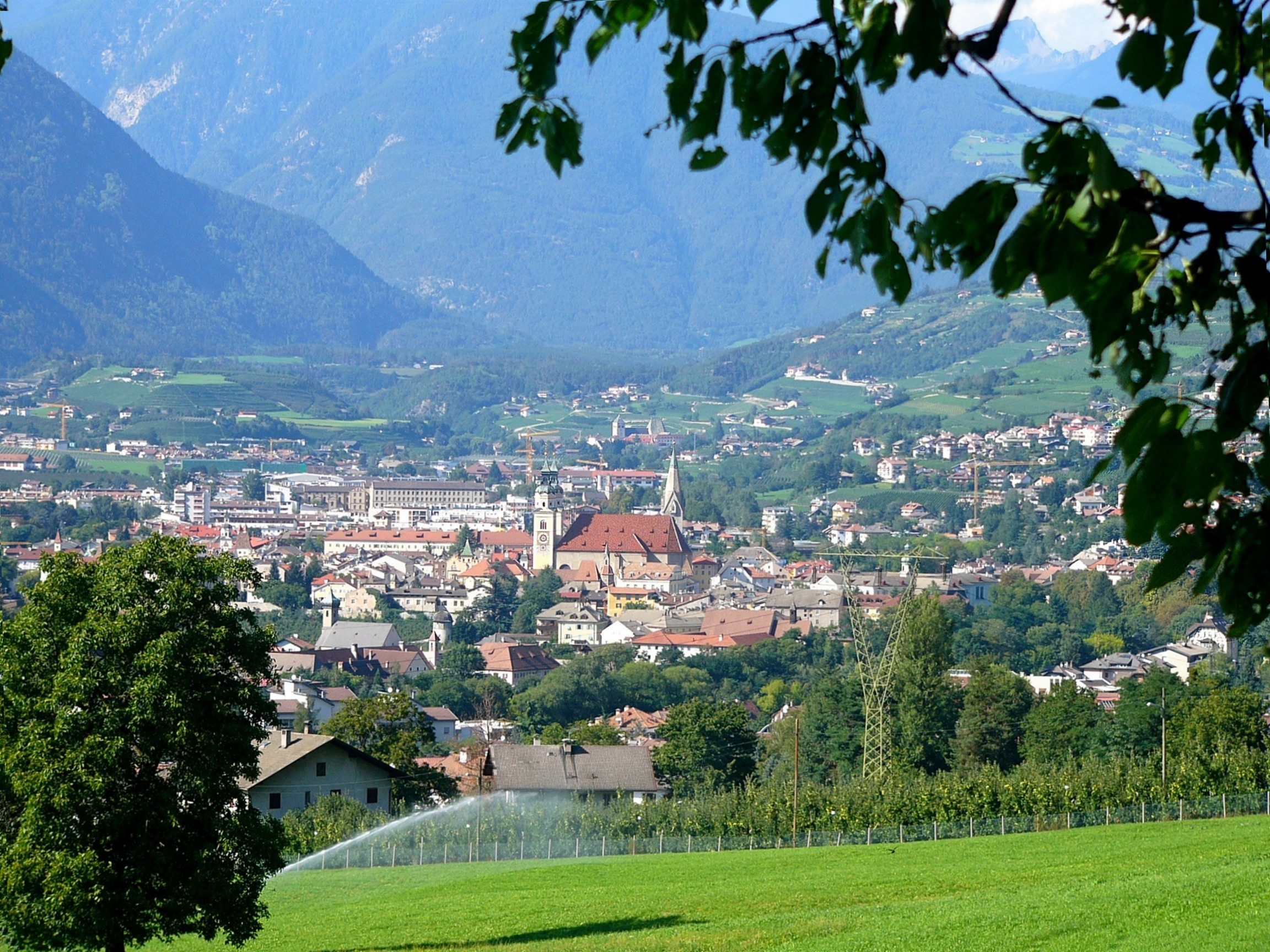 Brixen